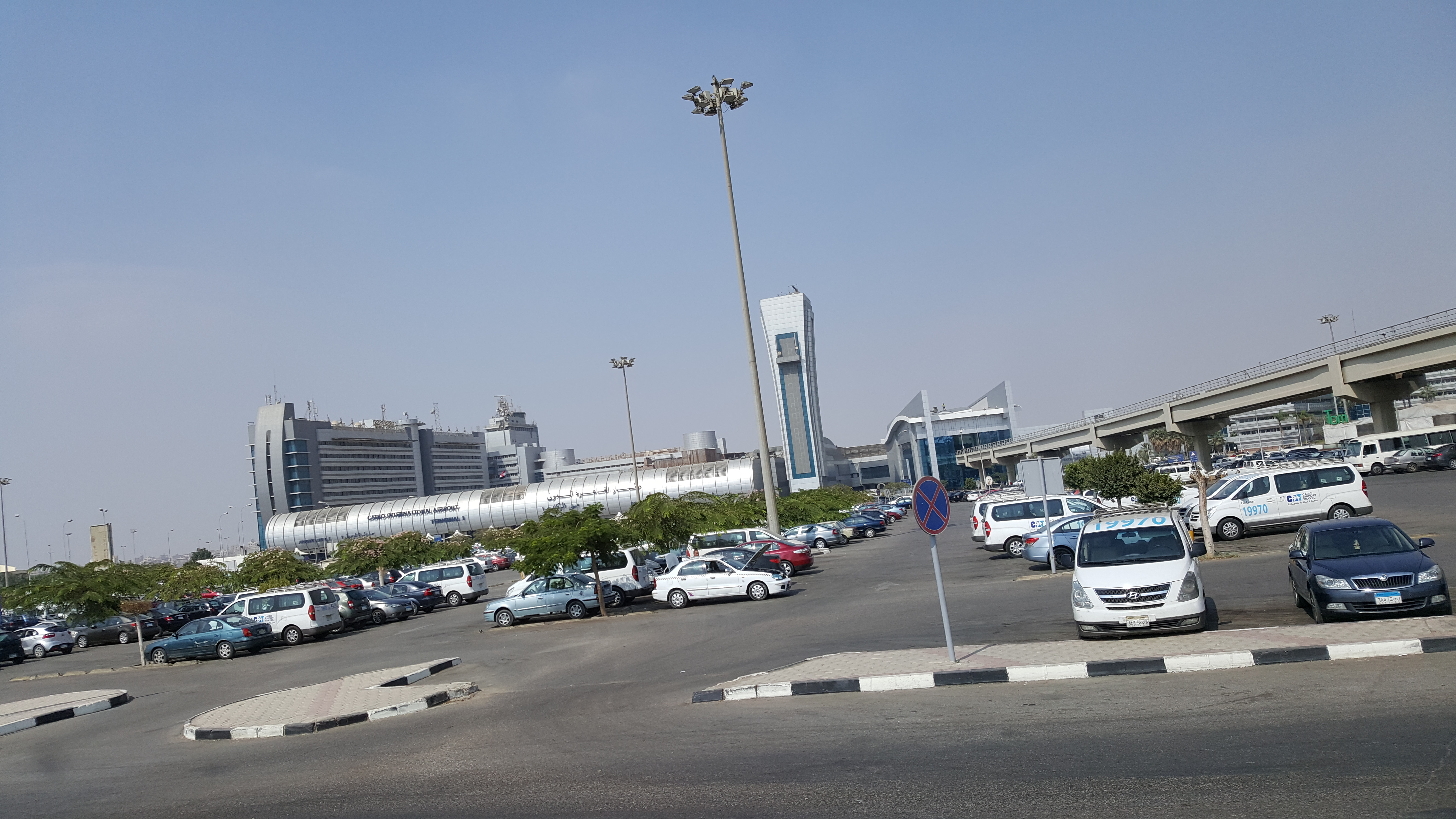 Cairo International Airport